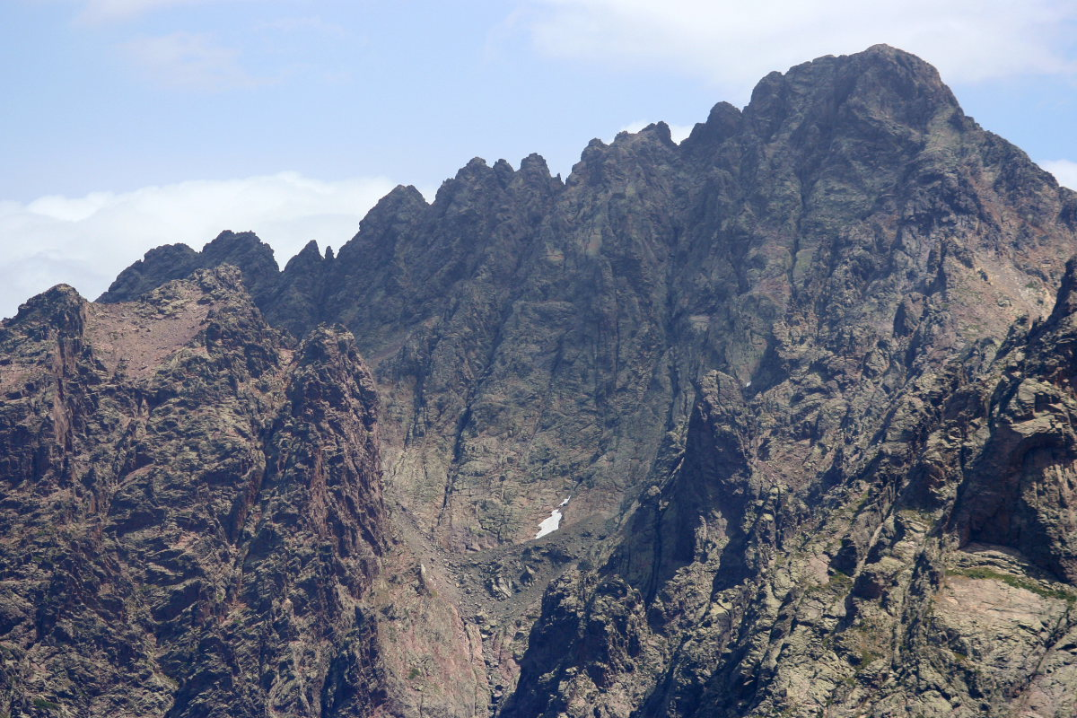 Le cirque de la Solitude au pied de Punta Minuta